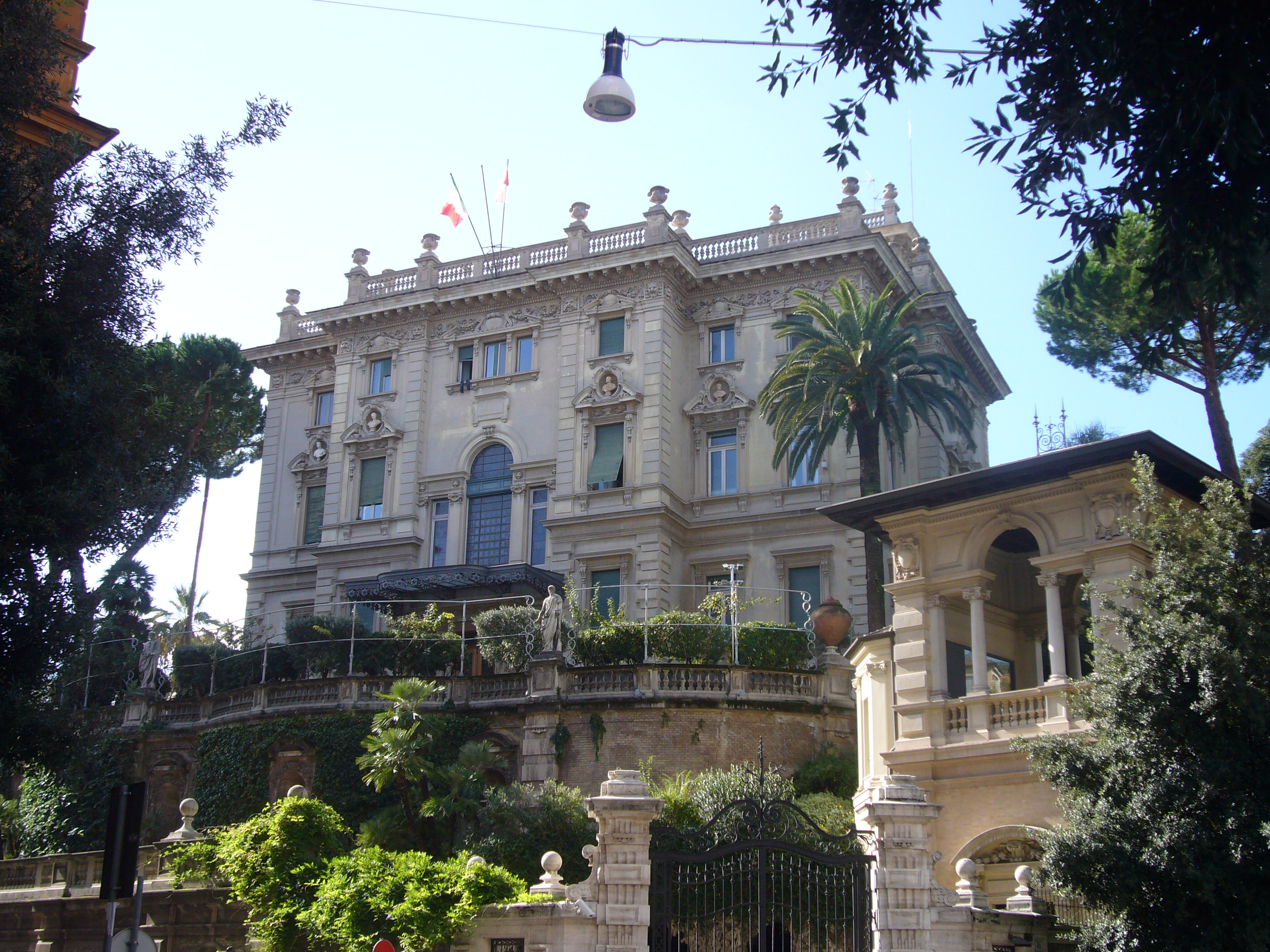 Roma, via Ludovisi angolo via Aurora, villino Maraini